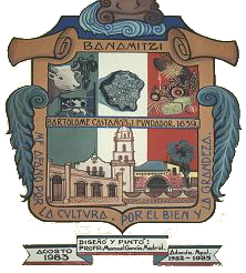 Escudo del municipio sonorense.